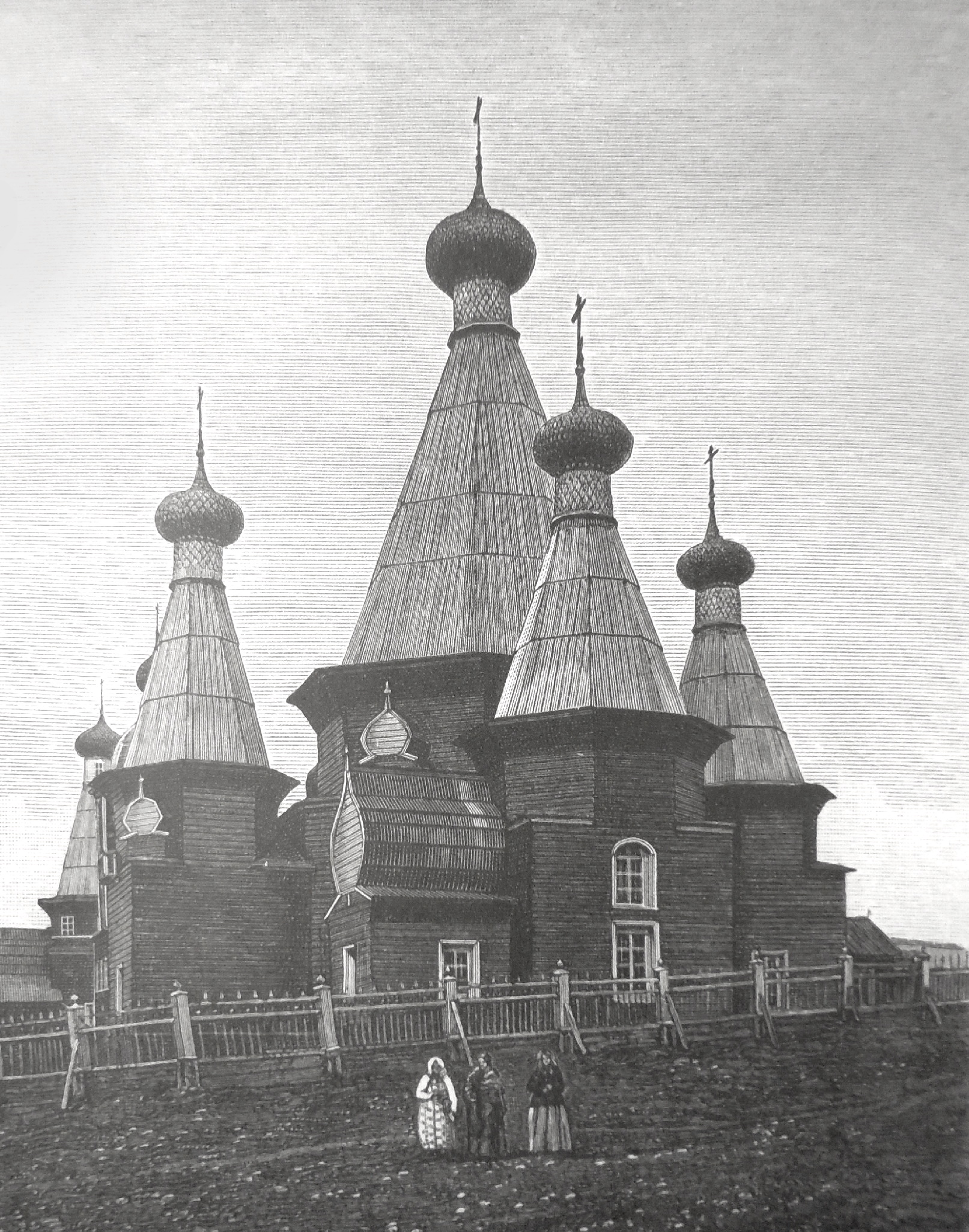 Церковь Троицы Живоначальной в Нёноксе